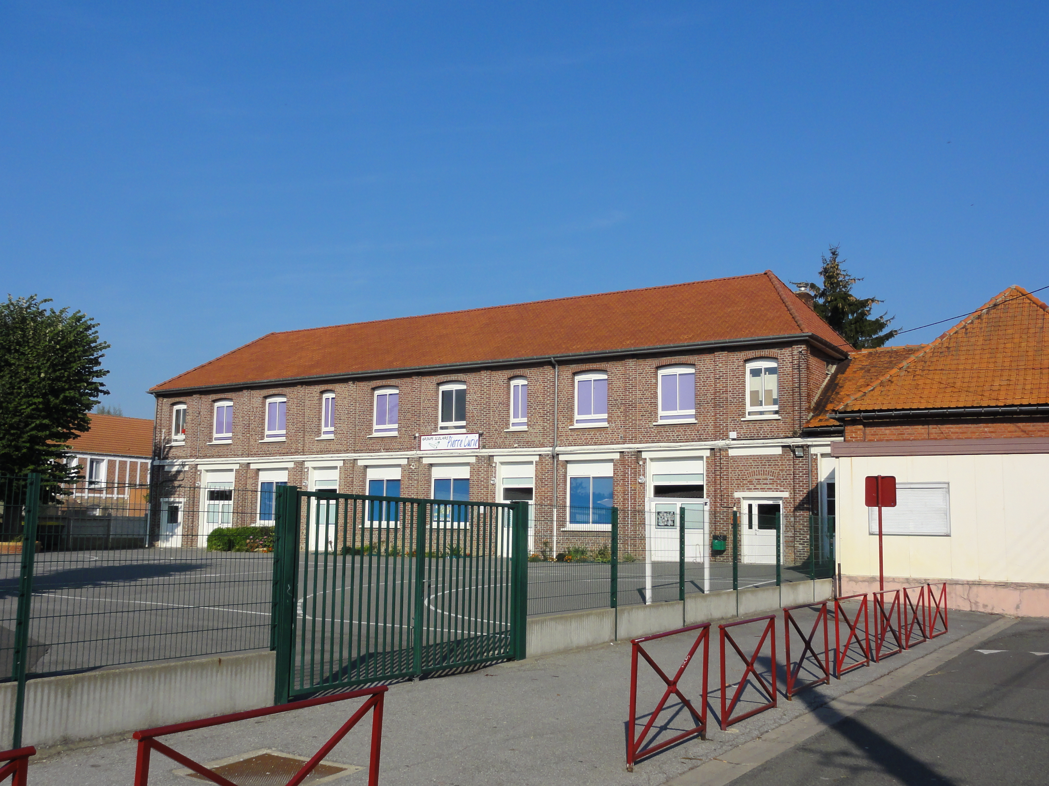 Écoles des cités de la Fosse n° 5 de la Compagnie des mines d'Ostricourt, Libercourt, Pas-de-Calais, Nord-Pas-de-Calais, France.